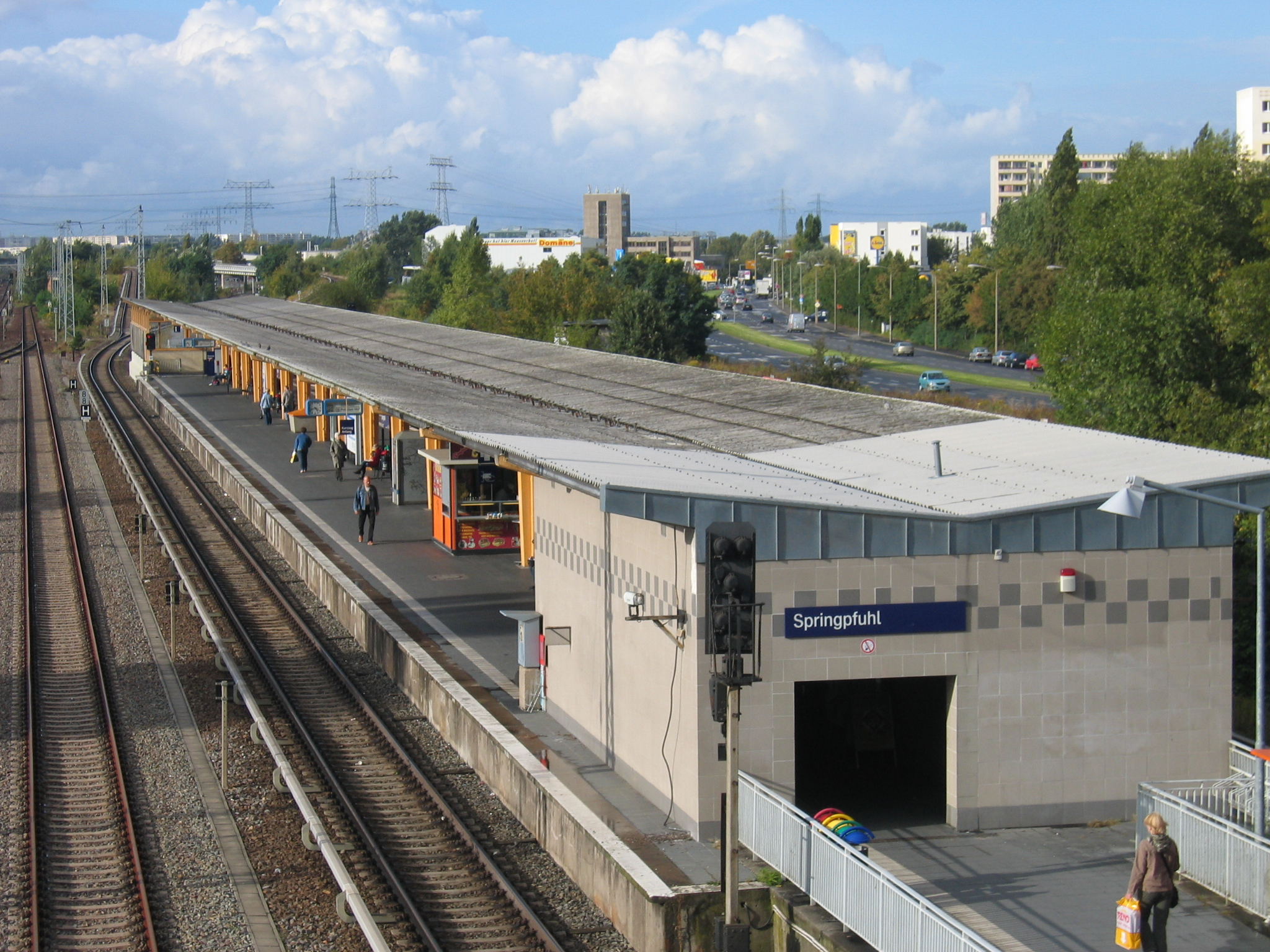 S-Bahnhof Berlin Sprngpfuhl